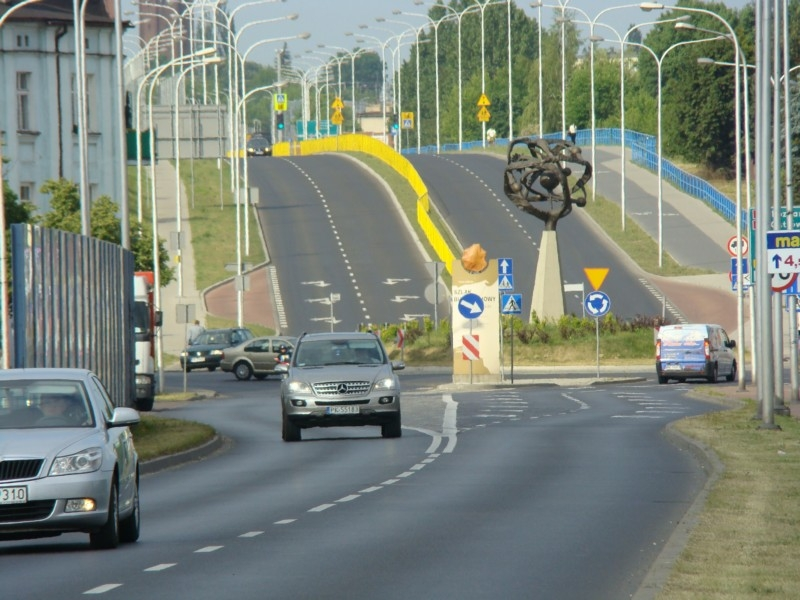 KALISZ majowe obrazki 291 / KOŚCIÓŁ PW. ŚW. GOTARDA /